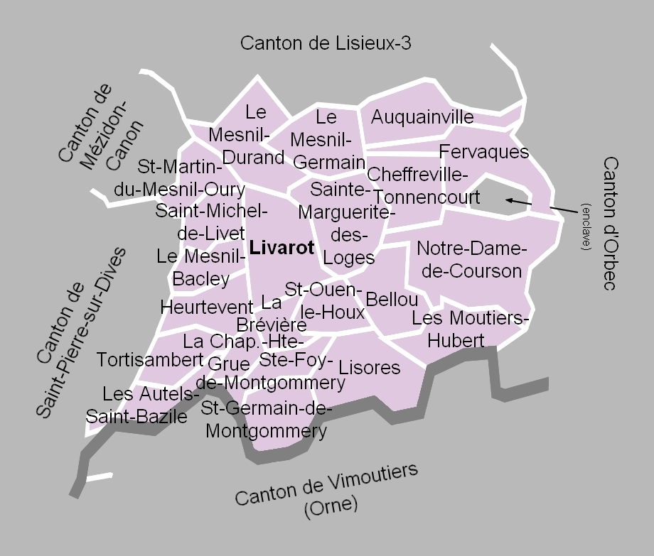 Carte du canton de Livarot en 2012.